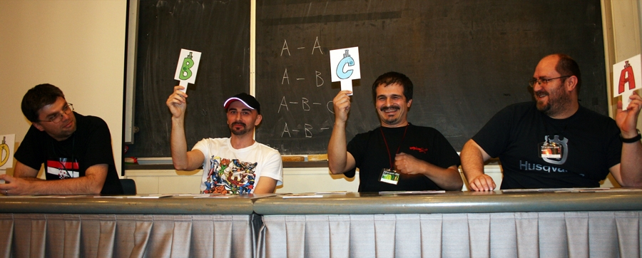 Sferakon 2011.